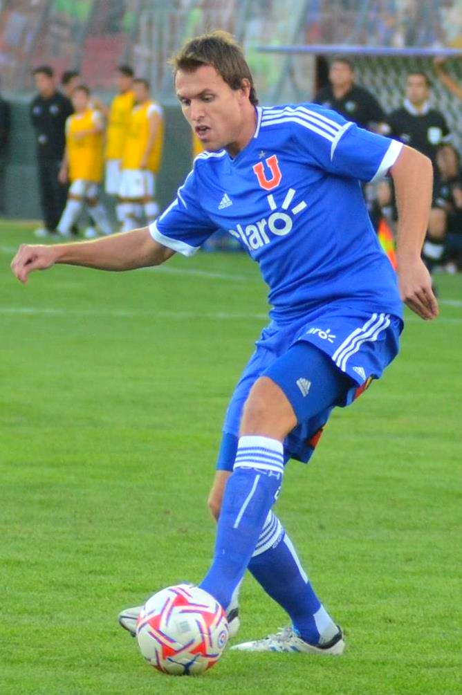 Volante club Universidad de Chile